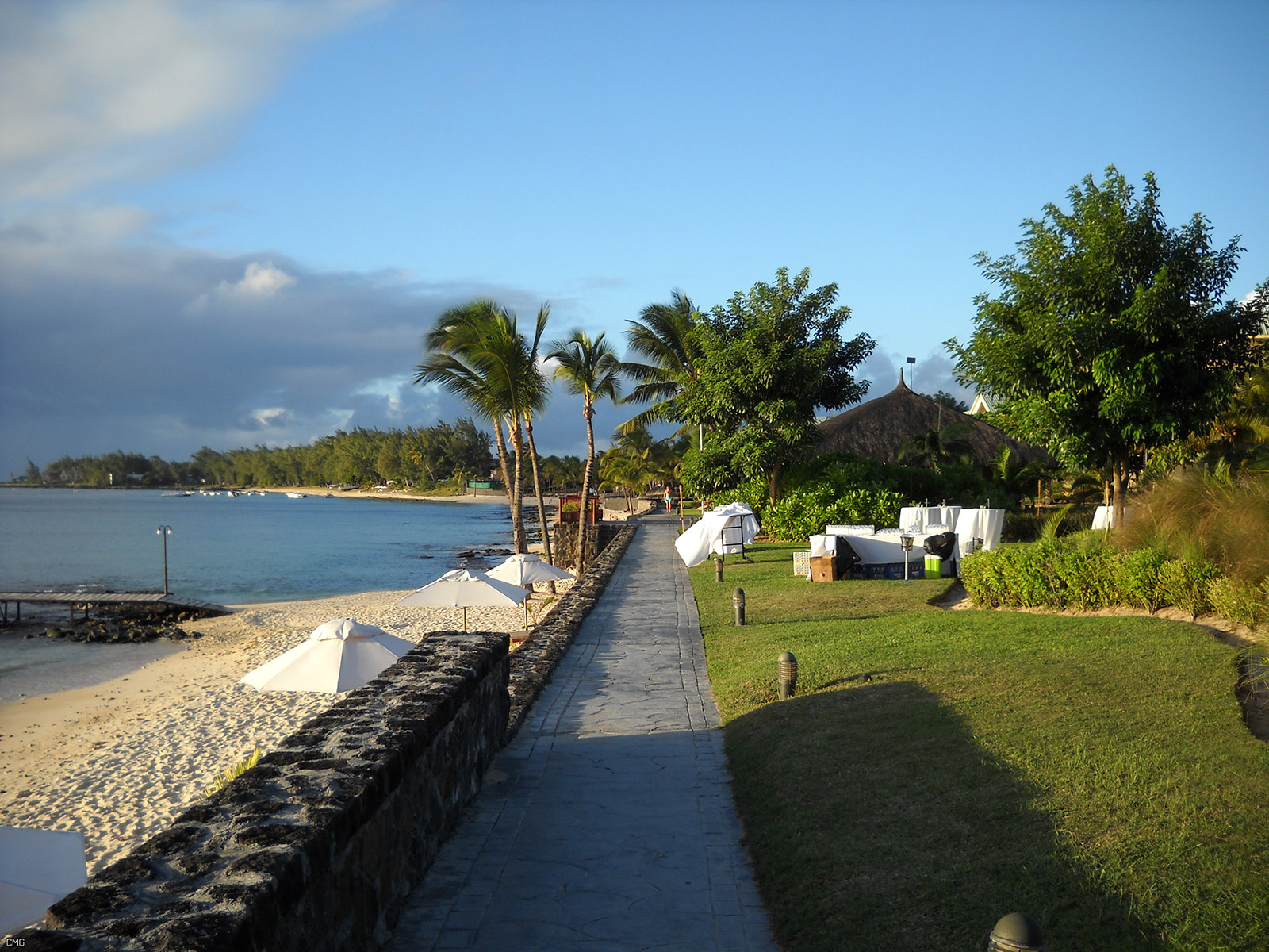 Le Meridien, Pointe aux Piments